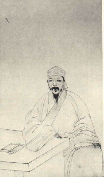 陳洪綬，清朝学者。Chen Hongshou